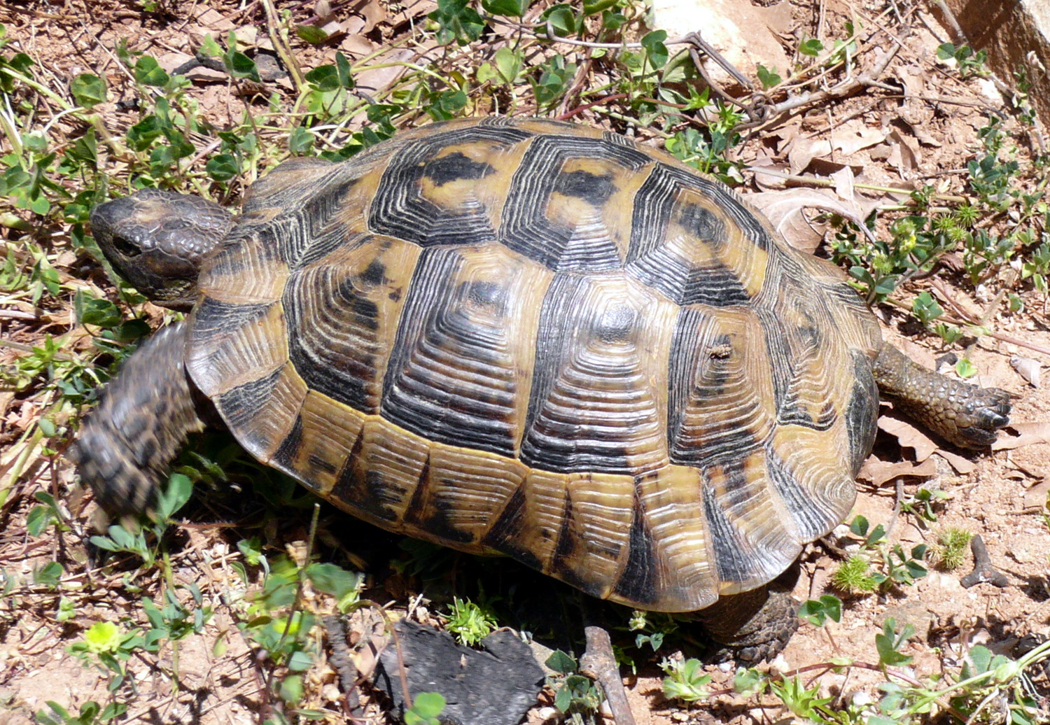 Hermann's Tortoise (Testudo hermanni)